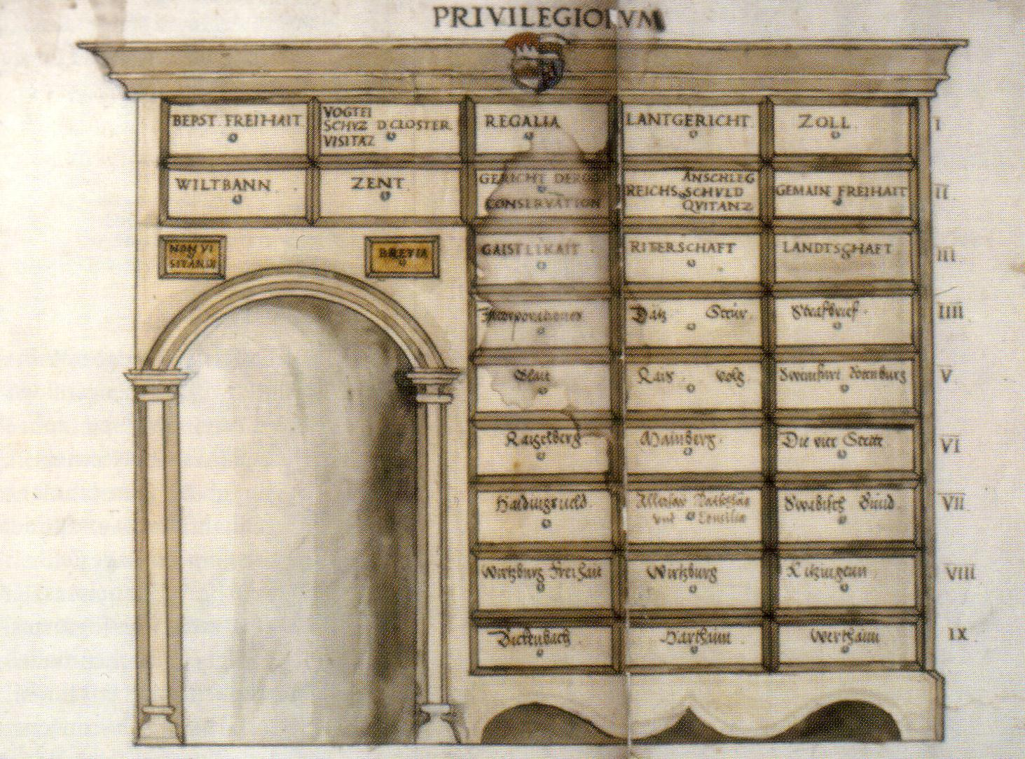 Archivschrank, Zeichnung im Staatsarchiv Würzburg MS 43, Bl. 4r